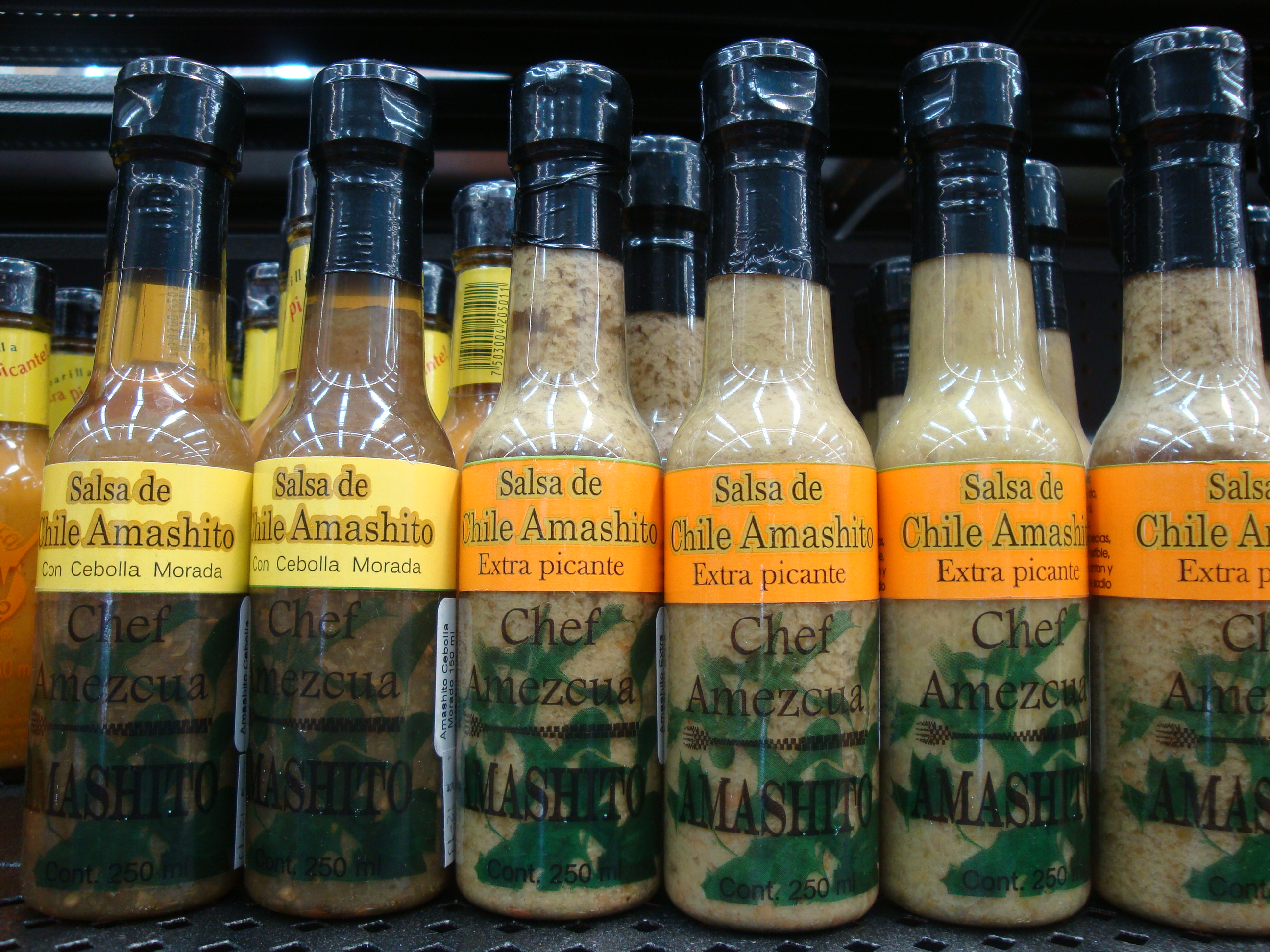 Salsas de chile amashito, elaboradas en el estado de Tabasco, México.